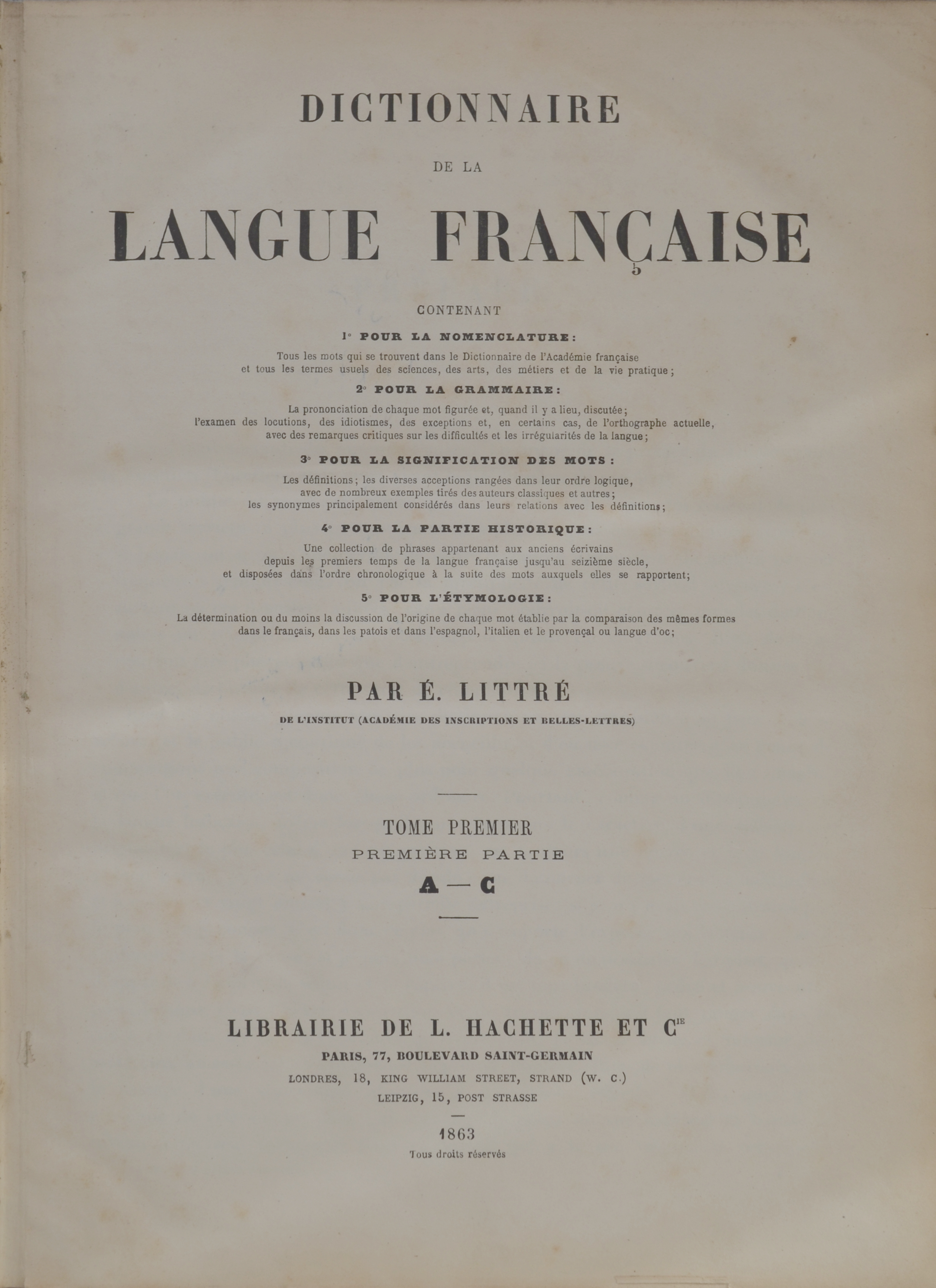 Dictionnaire de la langue française, plus connu comme le Littré - page de titre de la première partie du tome premier (A-C) de l'édition de 1863.